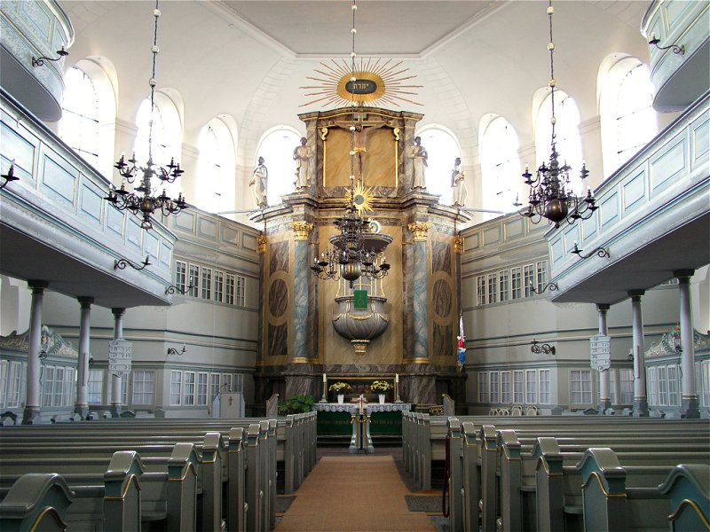 Kirche von Wilster (Schleswig-Holstein) -- Church of Wilster (Germany-Schleswig-Holstein)